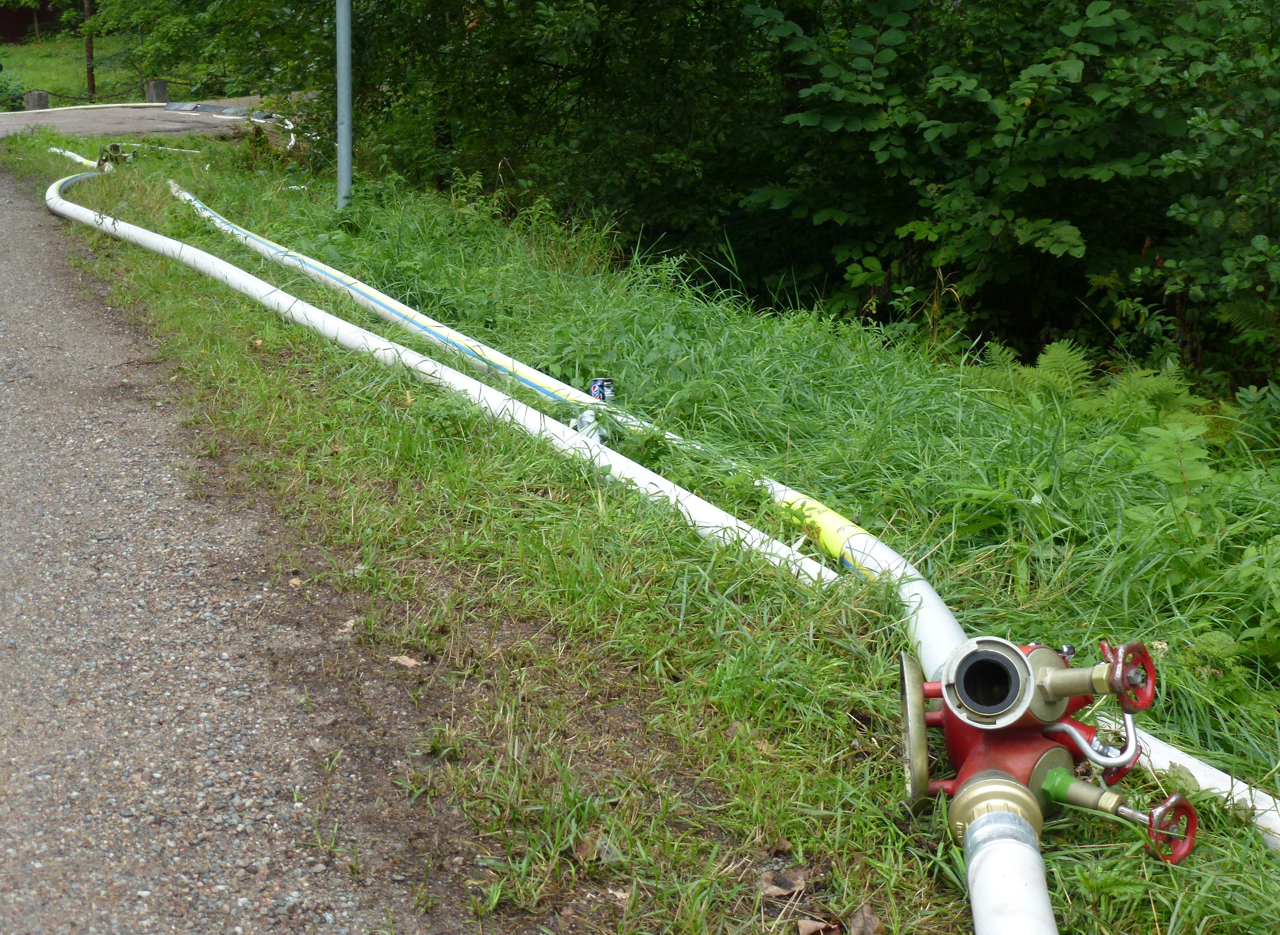 Skogsbranden i Västmanland, släckningsutrustning i Ängelsberg